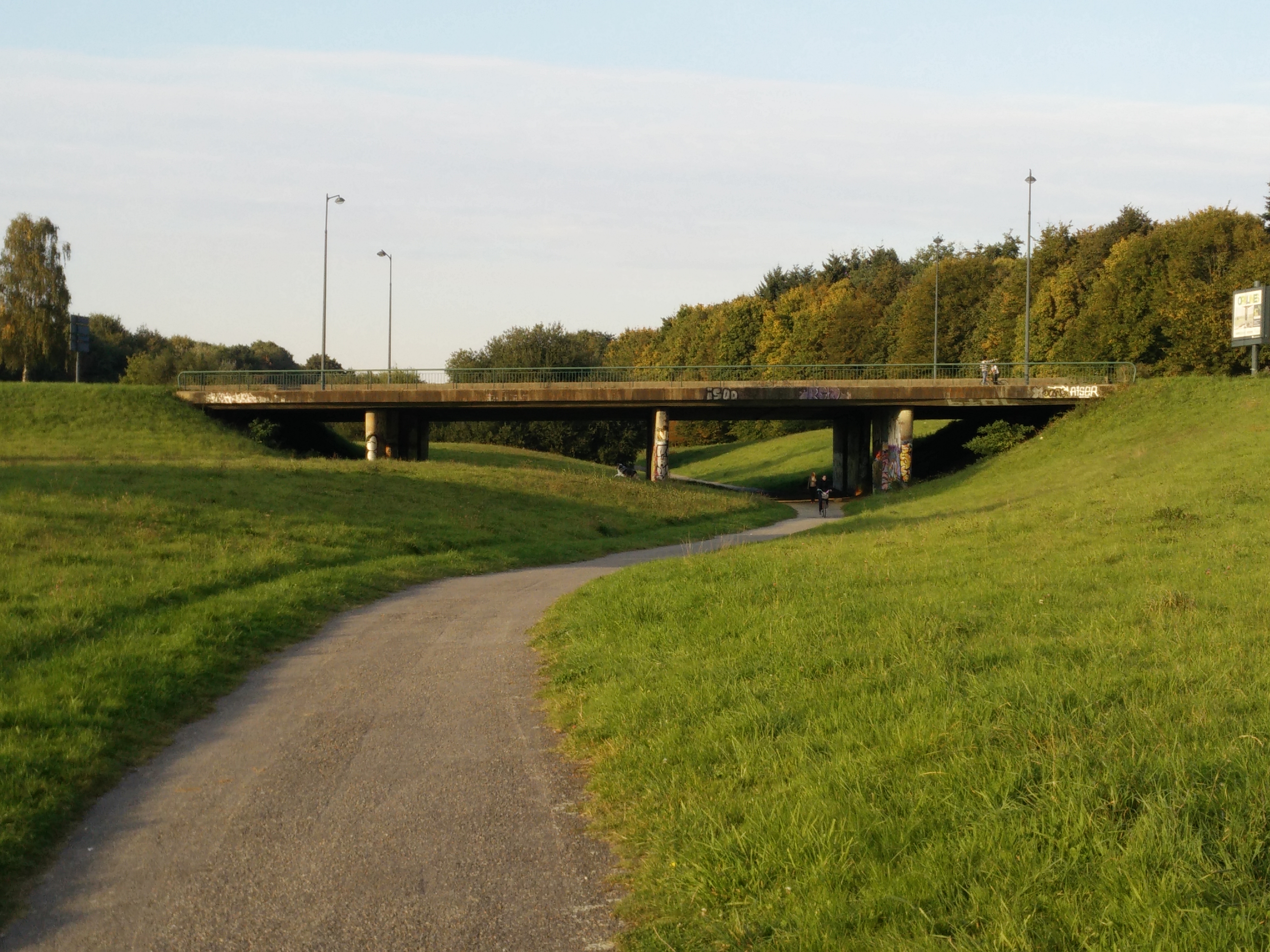 Vue du passage souterrain (face Sud), prévu pour construire une route en 2x2 voies. La moitié de ce vestige sert aujourd'hui de piste cyclable et piétonne.